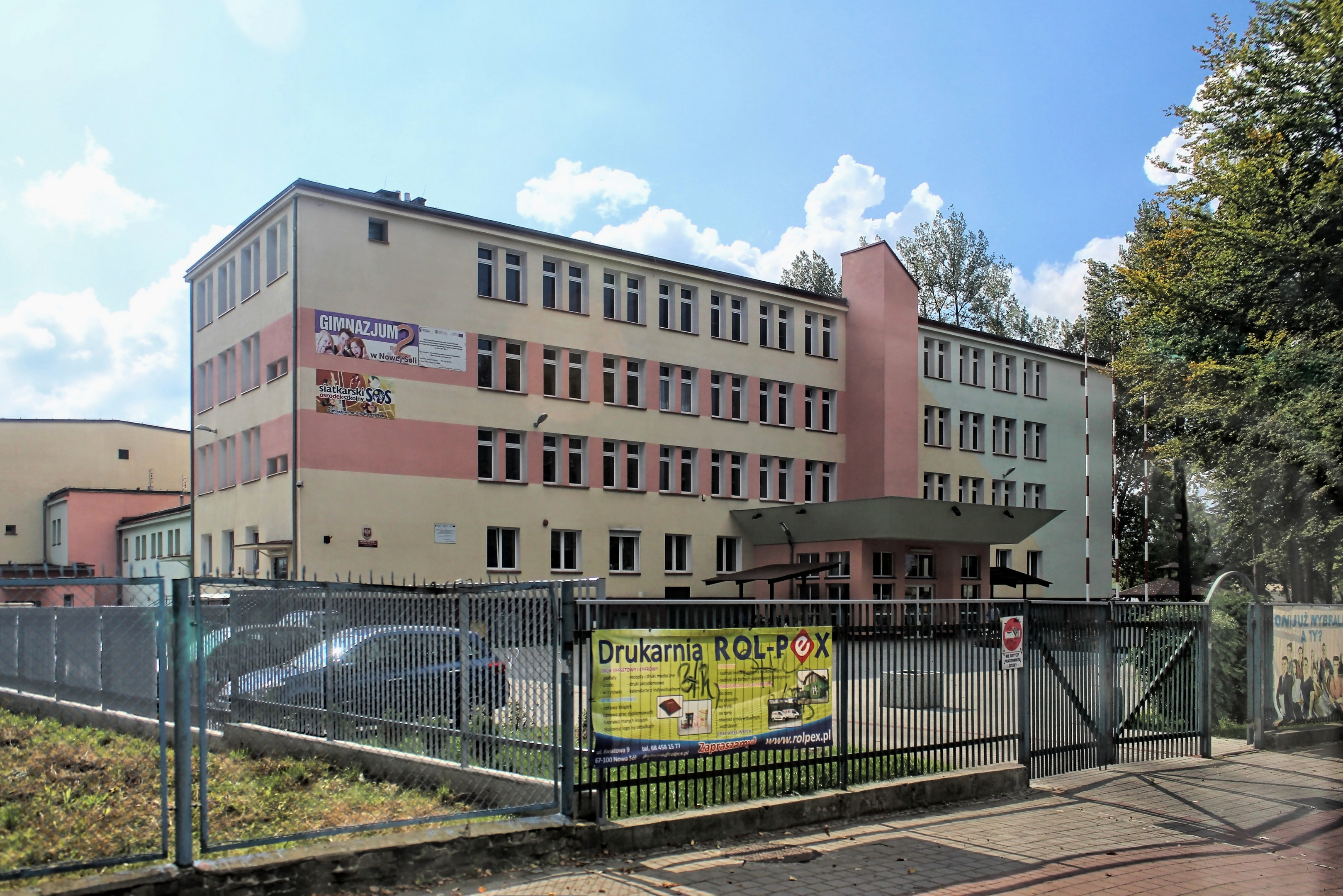 Nowa Sól, ul. Gimnazjalna. Gimnazjum nr 2